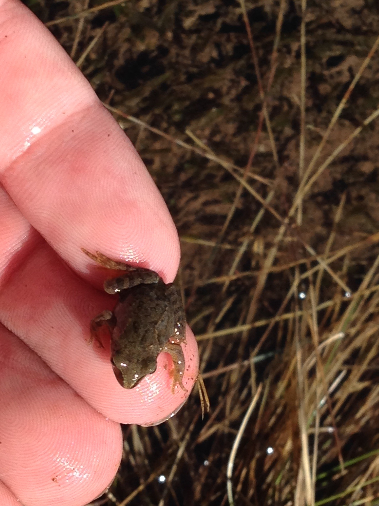 Une jeune grenouille rousse en Haute-Maurienne (Savoie) à 2300 mètres d'altitude